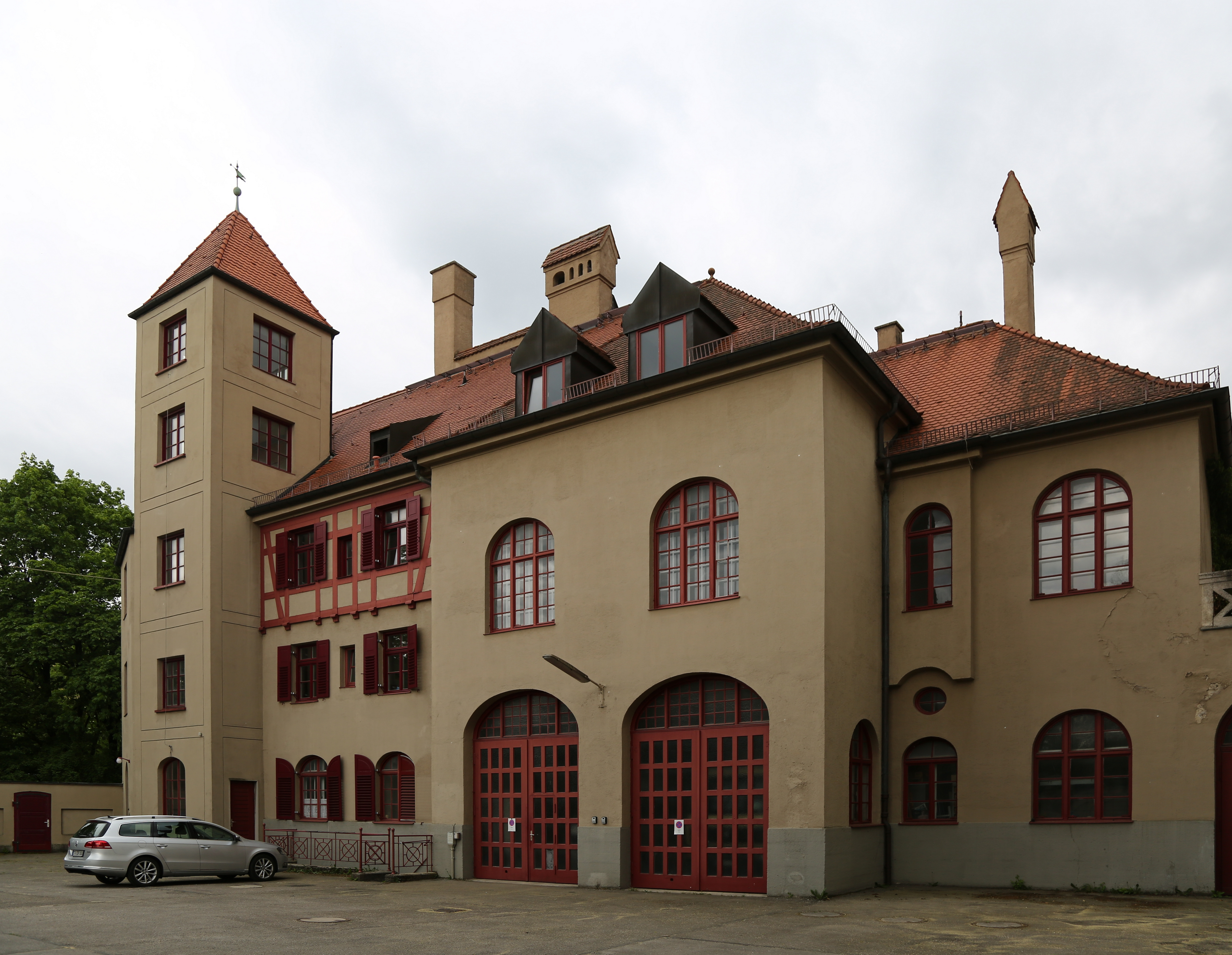 Alte Feuerwache Sendling, Boschetsrieder Straße 33, München-Thalkirchen. 1903/04 von Robert Rehlen, historisierender Stil mit Elementen der Neorennaissance und des Heimatstils